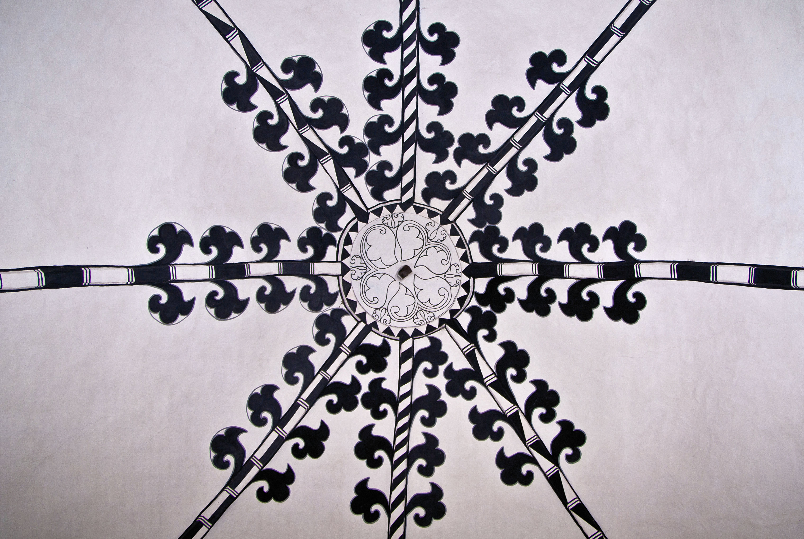 Dorfkirche Bernitt - Gewölbemalerei im Chor (Detail)